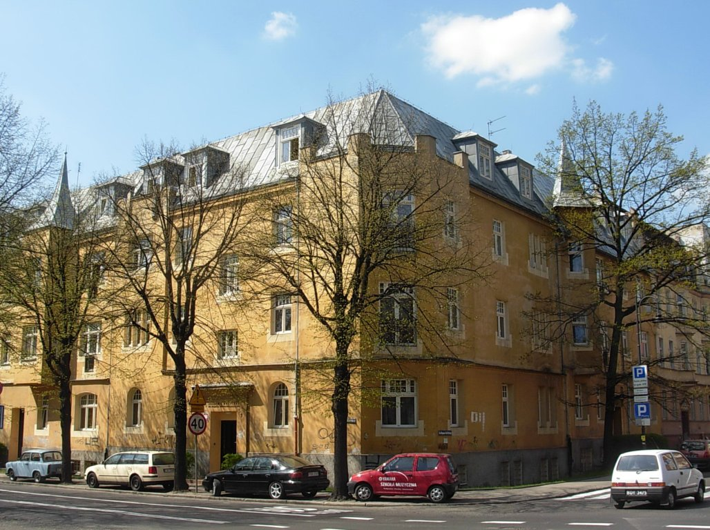 Dom studencki i obiekty dydaktyczne Akademii Muzycznej w Bydgoszczy przy ul. Staszica 7